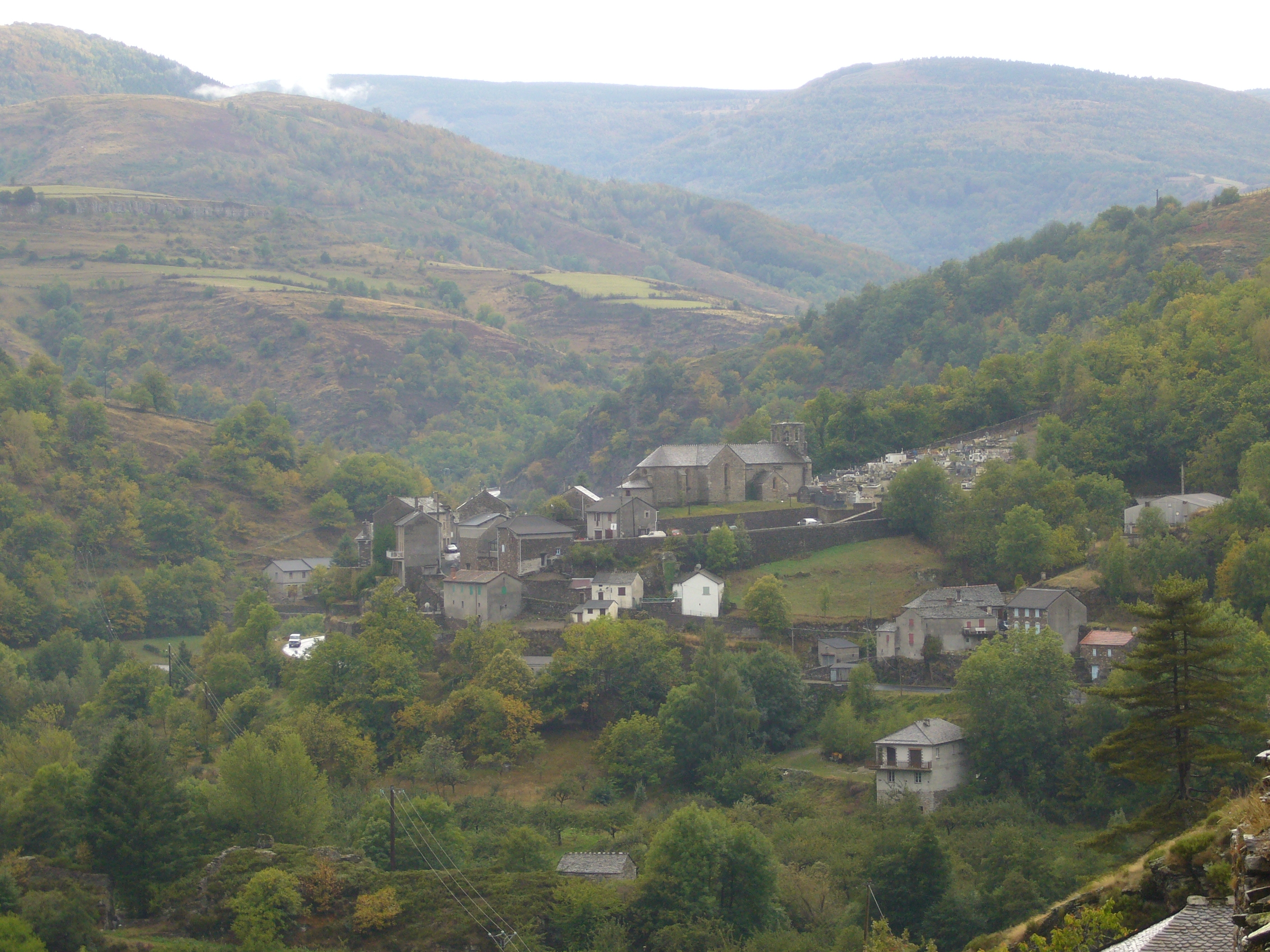 Vue générale du village d'Altier (Lozère, France)